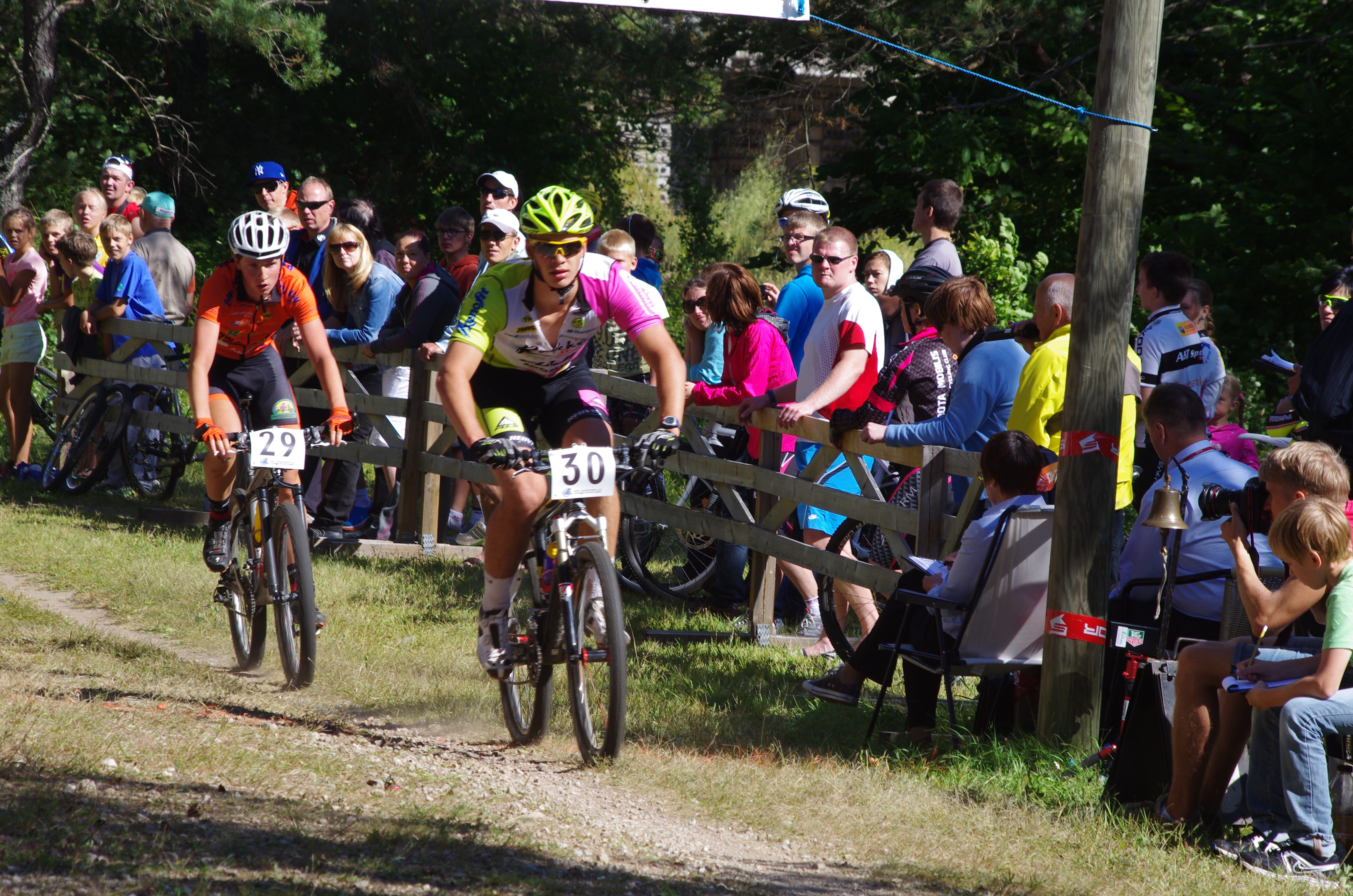 Jalgrattasport Keilas.